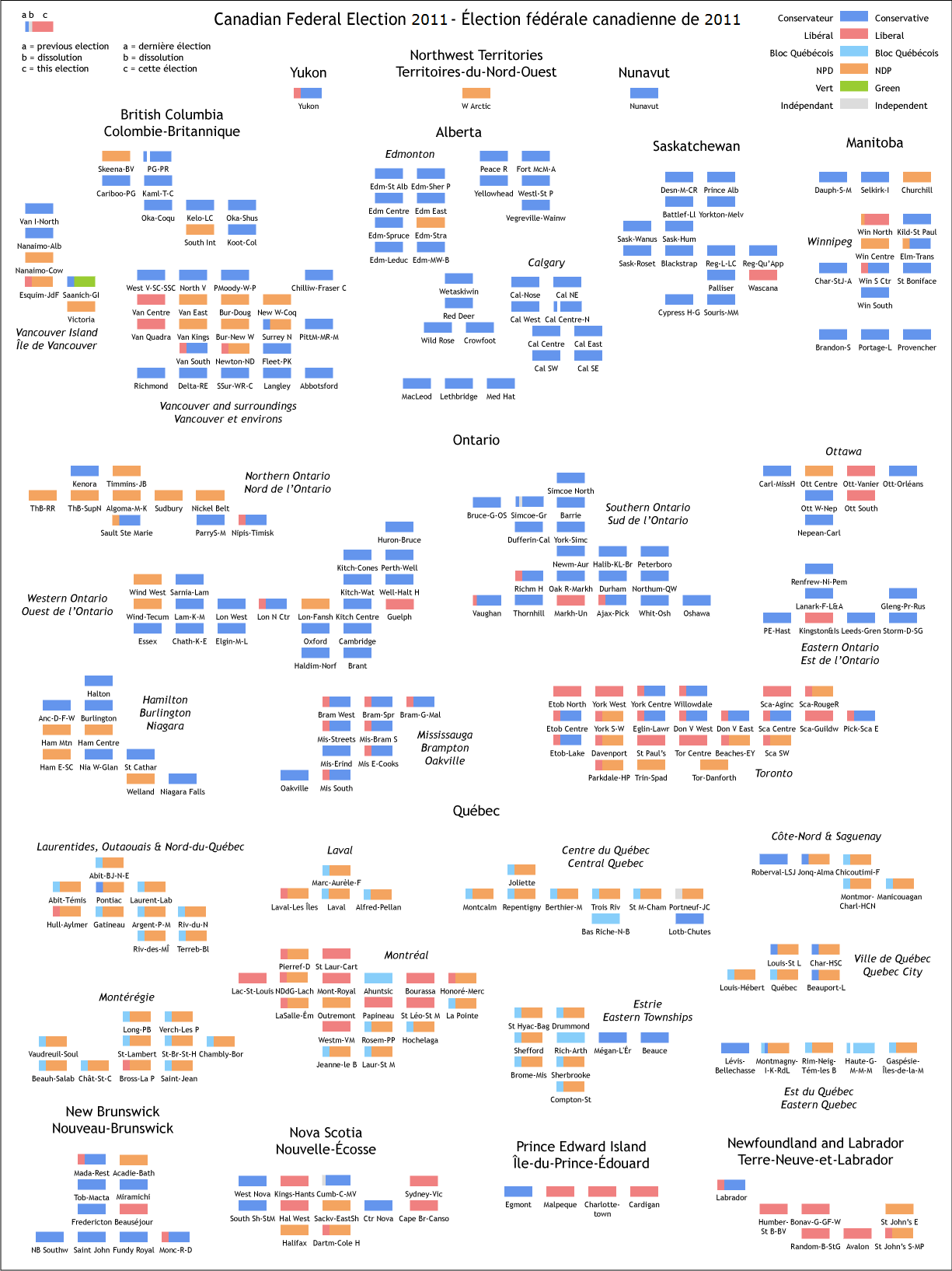 Résultats de l'élection fédérale canadienne du 2 mai 2011 et changements de circonscription.